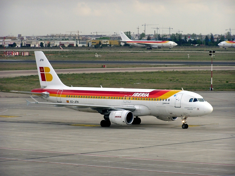 Airbus 320-214 EC-JFN at LEVC (Valencia-Manises)